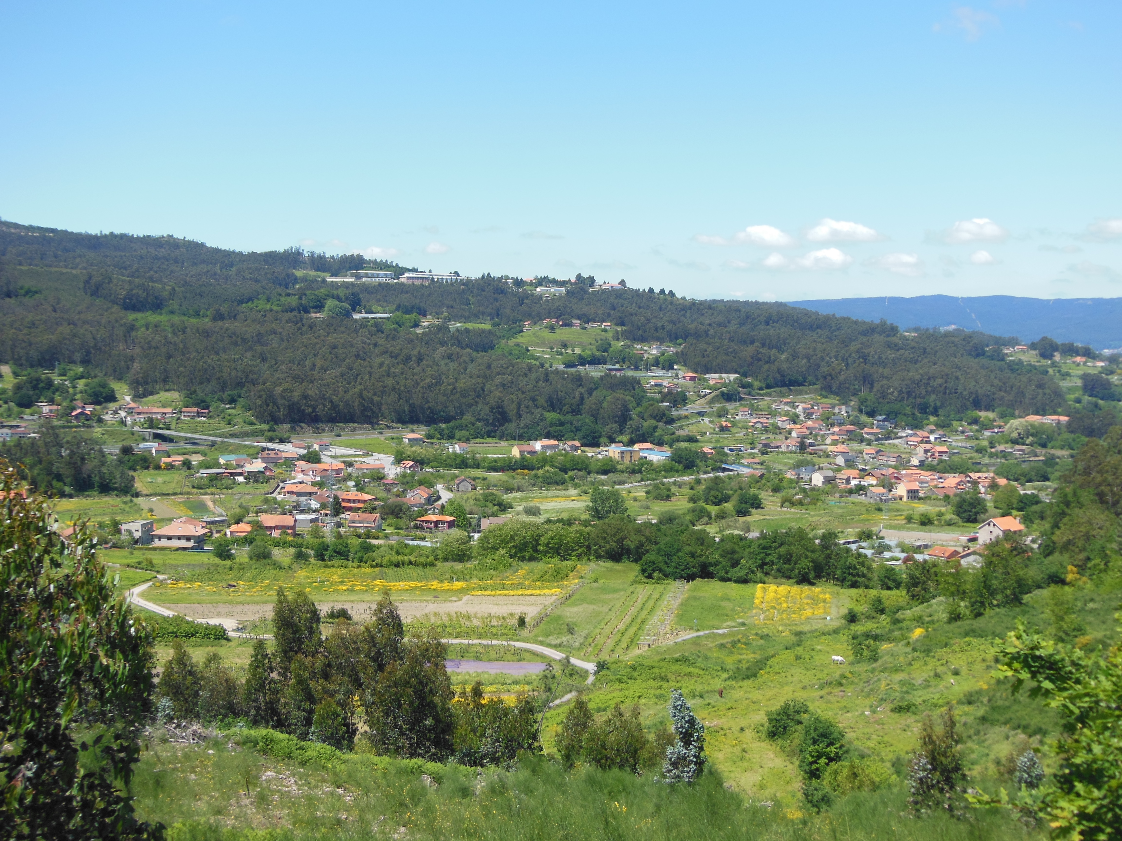 Vista da parroquia de Figueirido desde A Canicouva